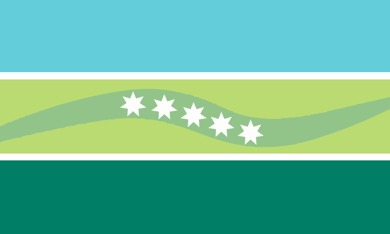 Bandera del cantón de Sarapiquí, Costa Rica.